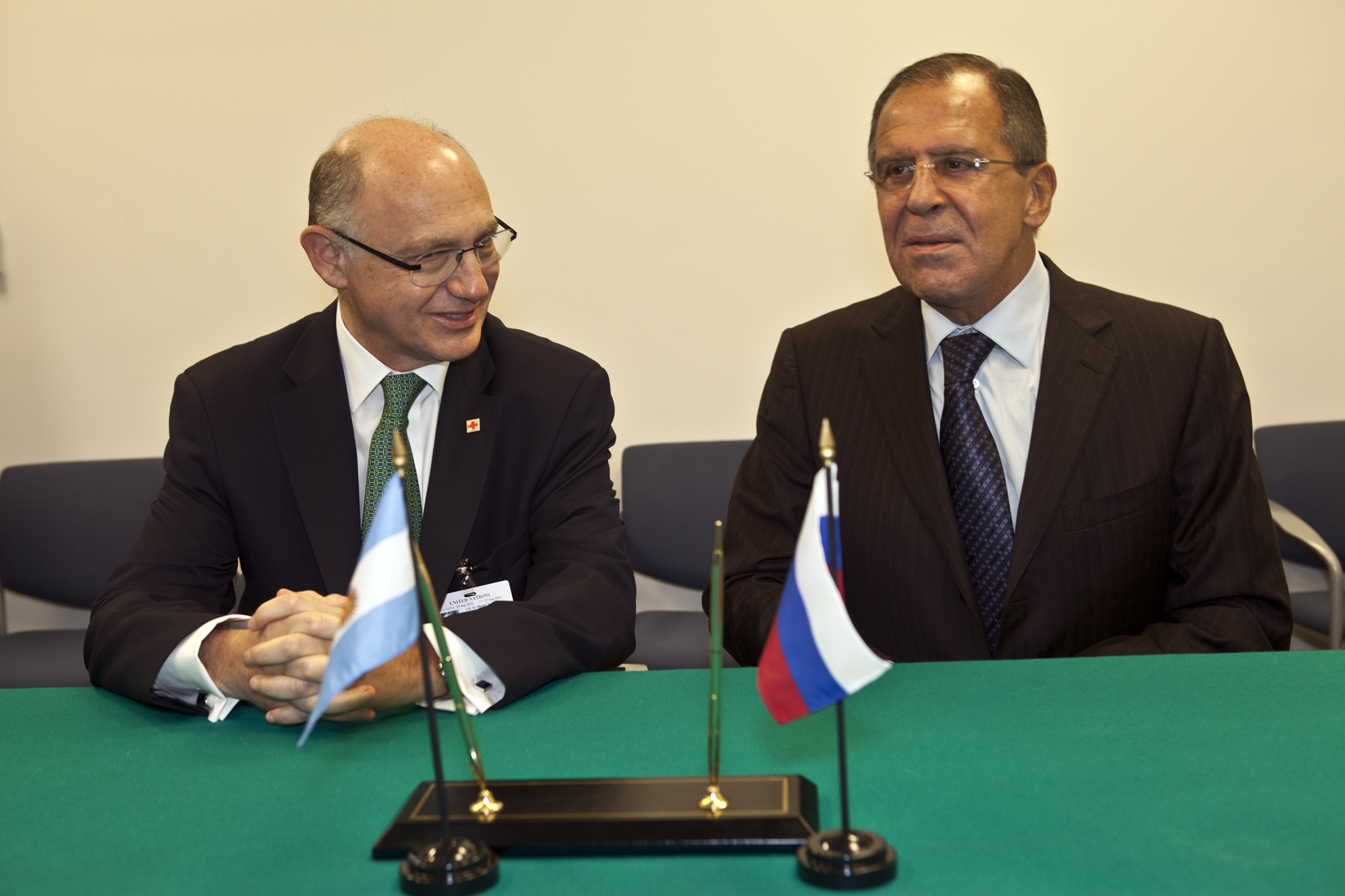 Foto: Cancillería. El Canciller Héctor Timerman en reunión bilateral con su par de la Federación Rusa, Sergei Lavrov, en la sede de la ONU, en el marco de la Asamblea General. Allí firmaron un acuerdo para la instrumentación del Plan de Acción de la Cooperación Estratégica. 22/9/11